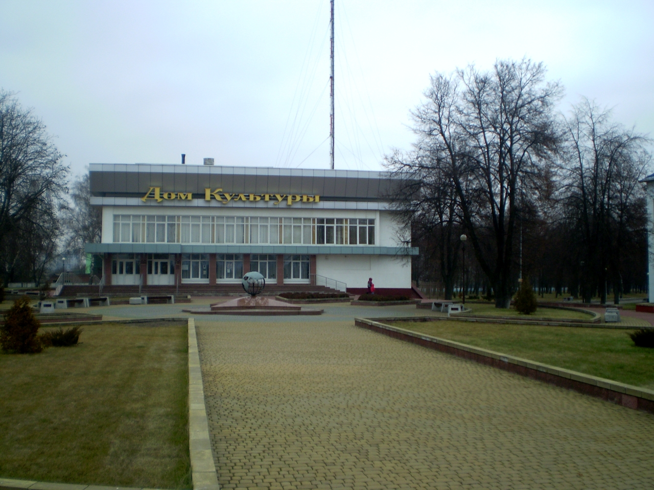 Дом Культуры